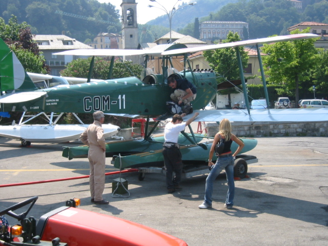 Hydravion de l'Aéro-club du Lac de Come en Italie The green seaplane is a Caproni Ca.100 Idro